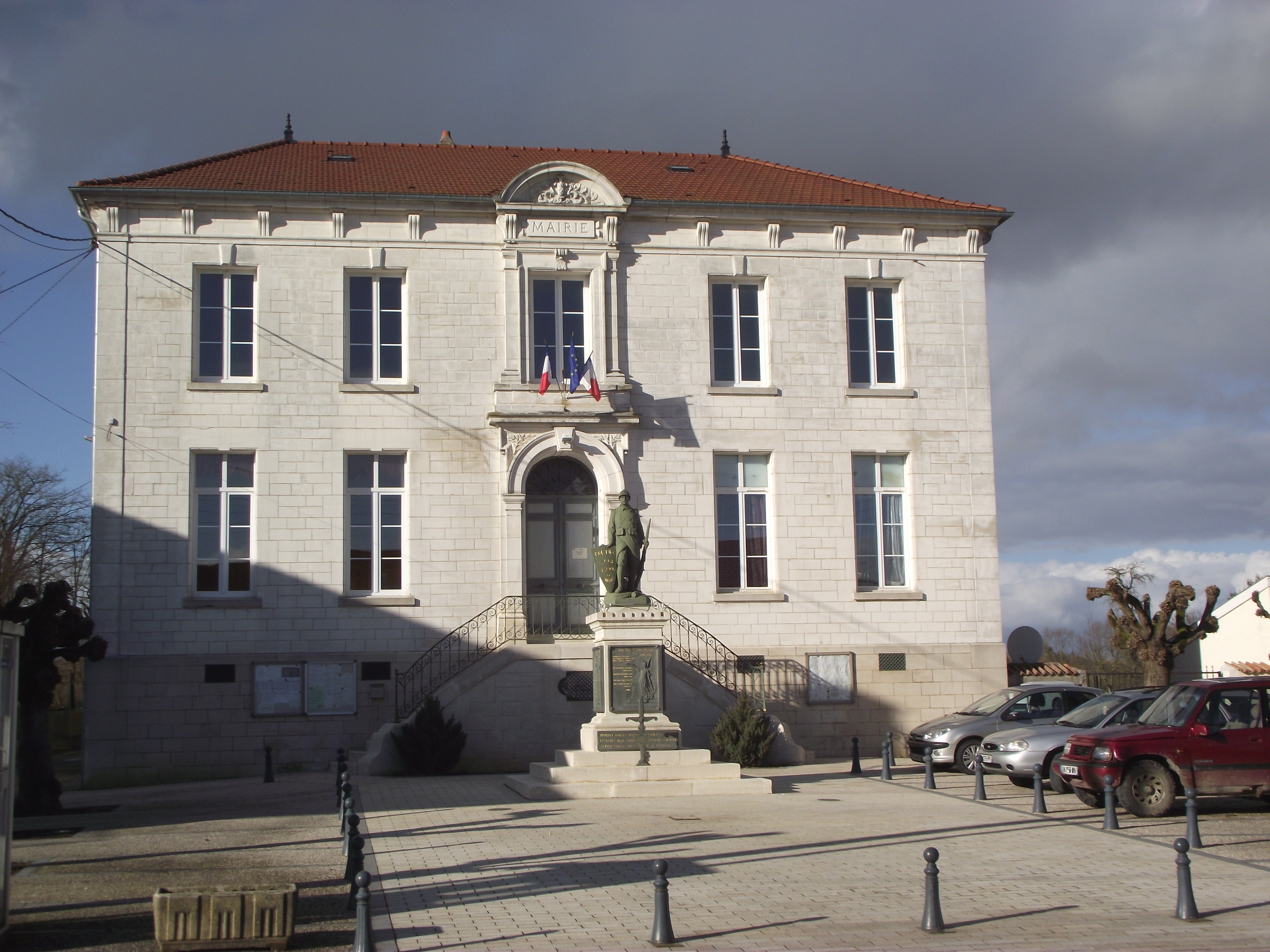 La Mairie de Rigny-la-Salle